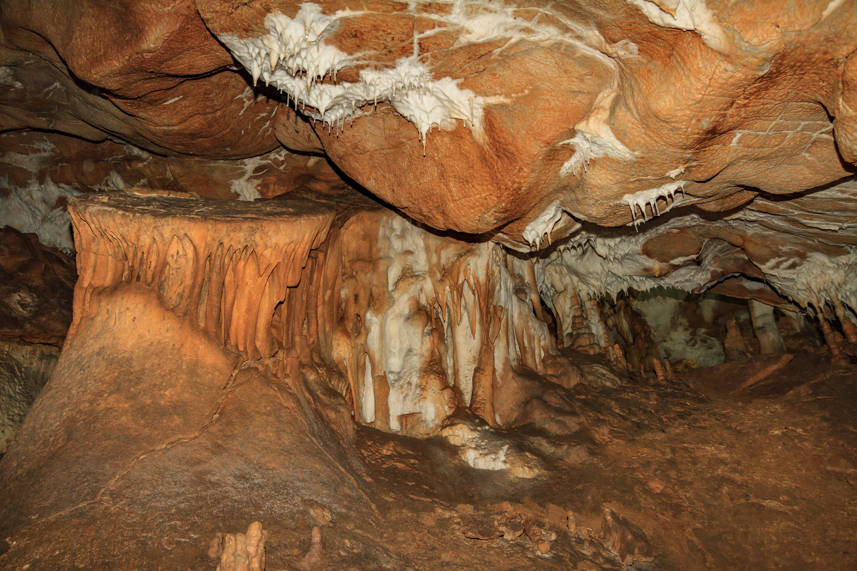 Ово је фотографија заштићеног природног добра у Србији под шифром: СП264This is a a photo of a natural area in Serbia with ID: СП264 Споменик природе Пећина Церемошња